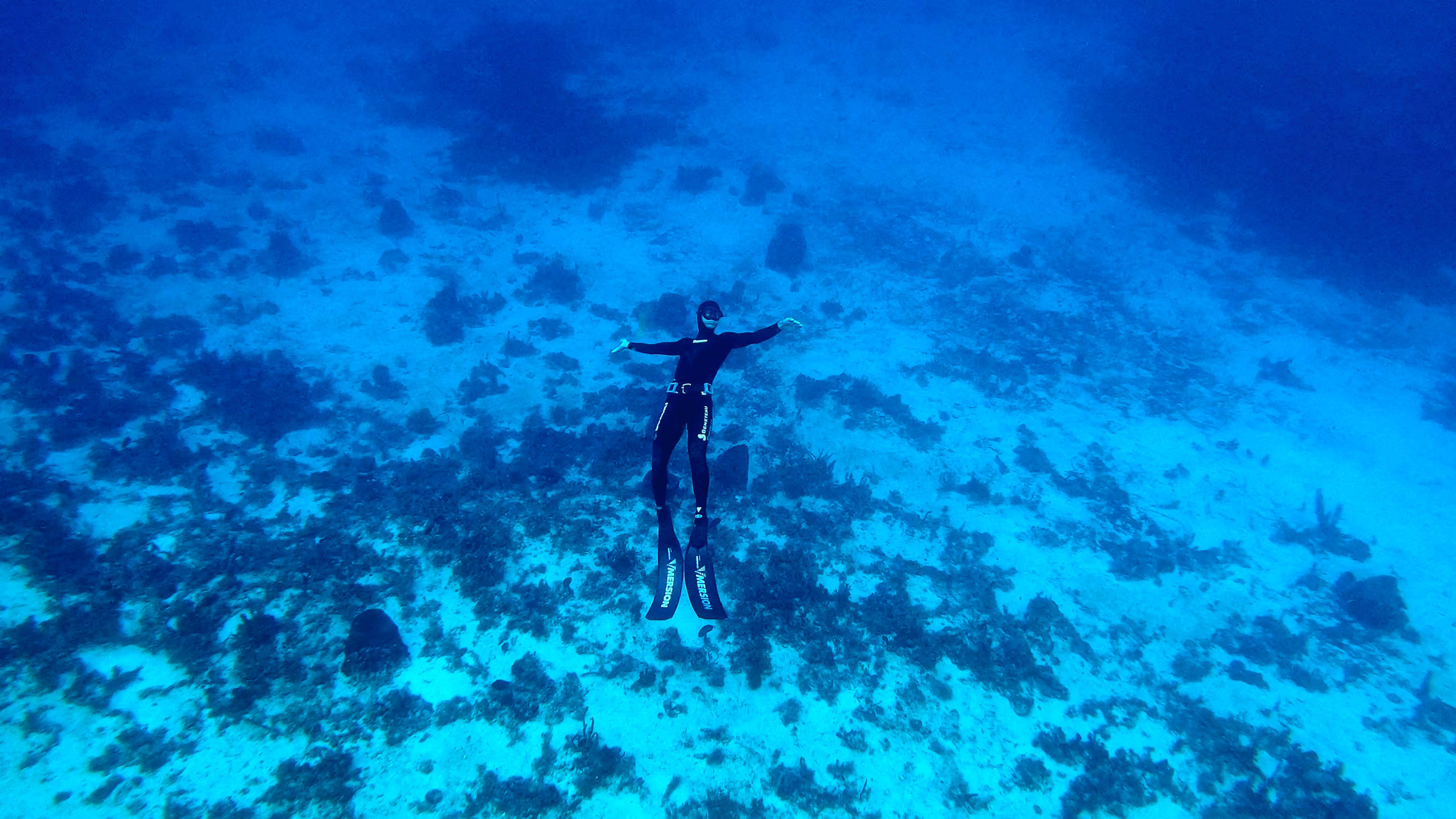 Stéphane Mifsud en train de communier avec l'Océan lors de l'une de ses apnée